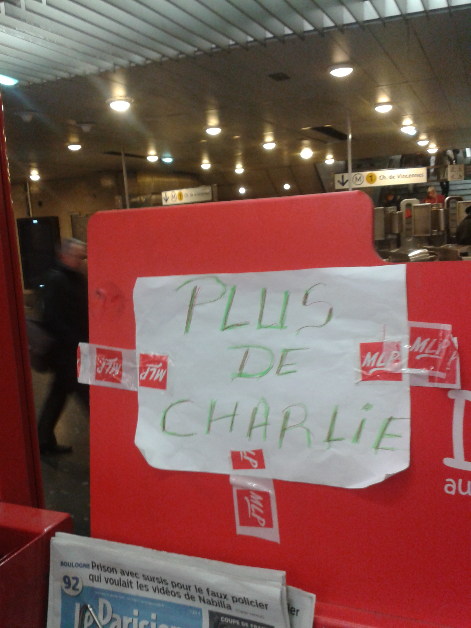 Affichette dans un kiosque francilien, annonçant que le numéro 1178 de Charlie Hebdo est en rupture de stock.